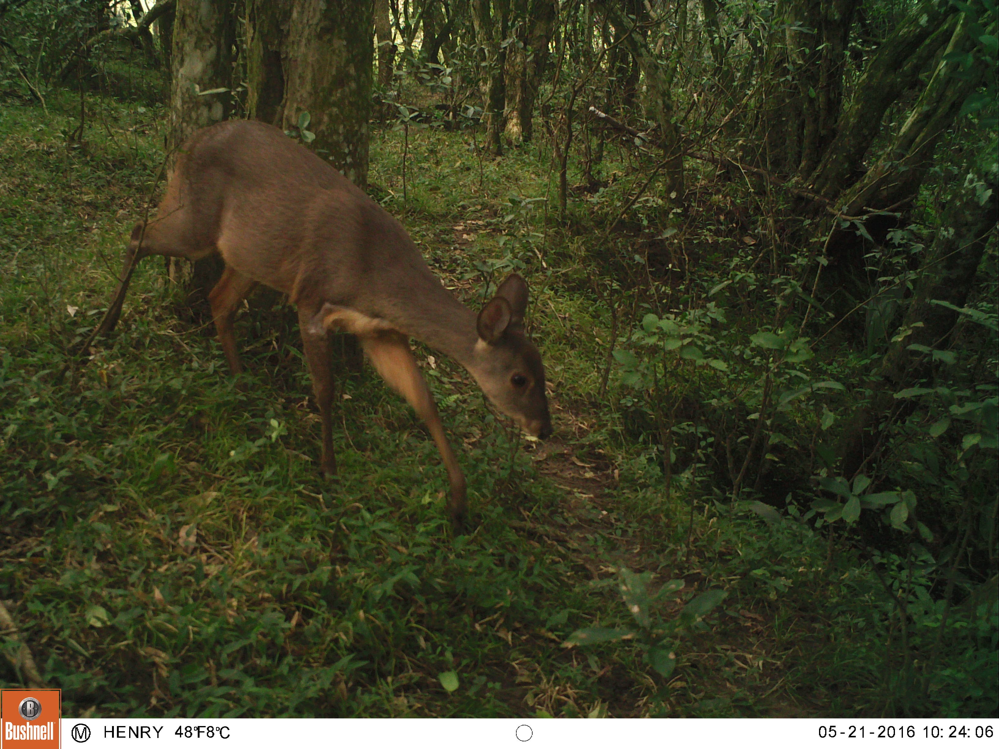 Esta fotografía fue tomada por la organización uruguaya JULANA "Jugando con la naturaleza", en el marco de un proyecto de cámaras trampa para captar la fauna nativa, en Paso Centurion, departamento de Cerro Largo (Uruguay).